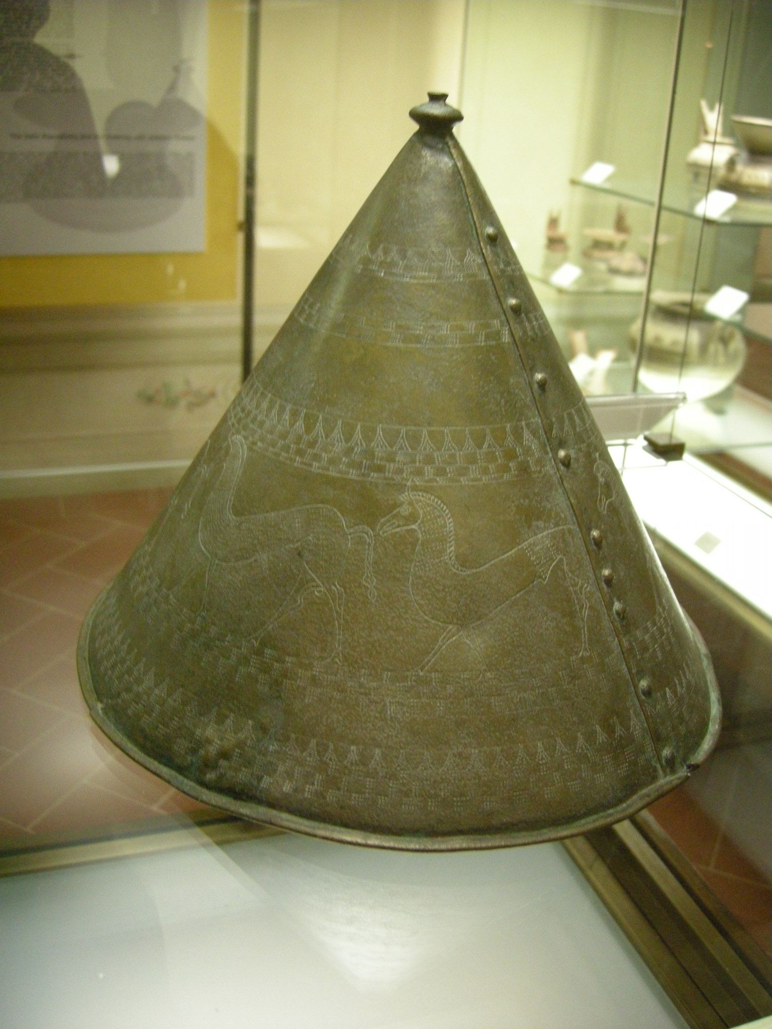 Museo archeologico di Firenze, elmo pileato paleoveneto da oppeano (V sec. ac)